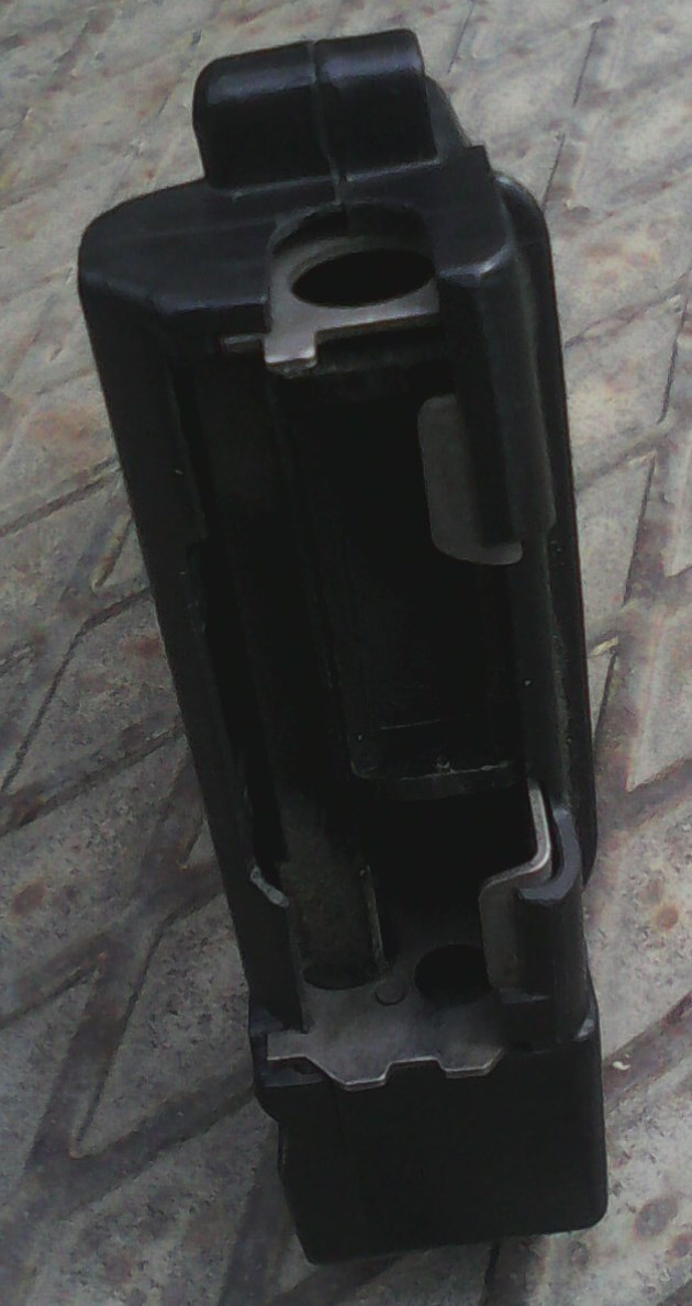 УДАР (устройство дозированного распыления аэрозоля).